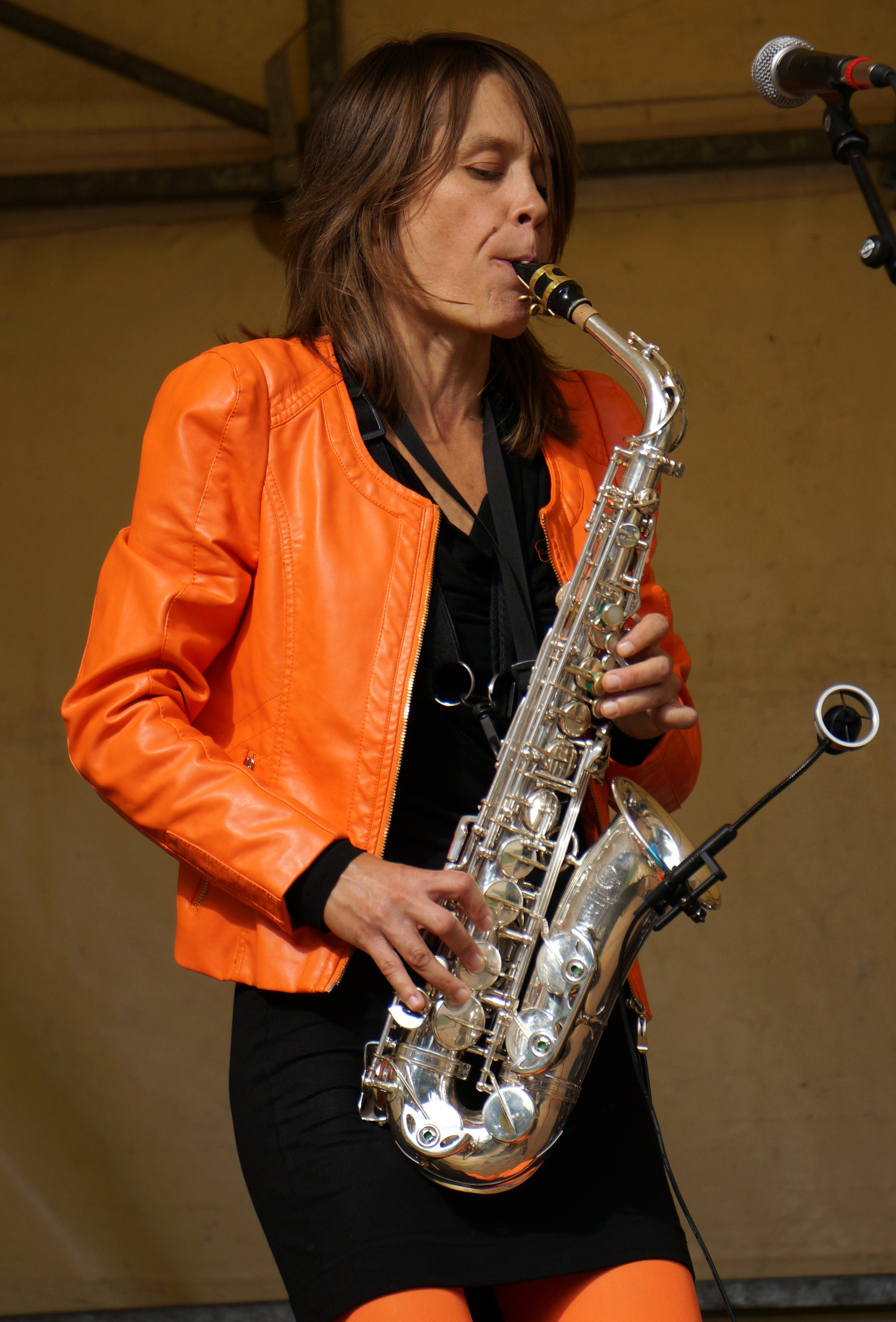 Céline_Bonacina_trio au square Colbert.